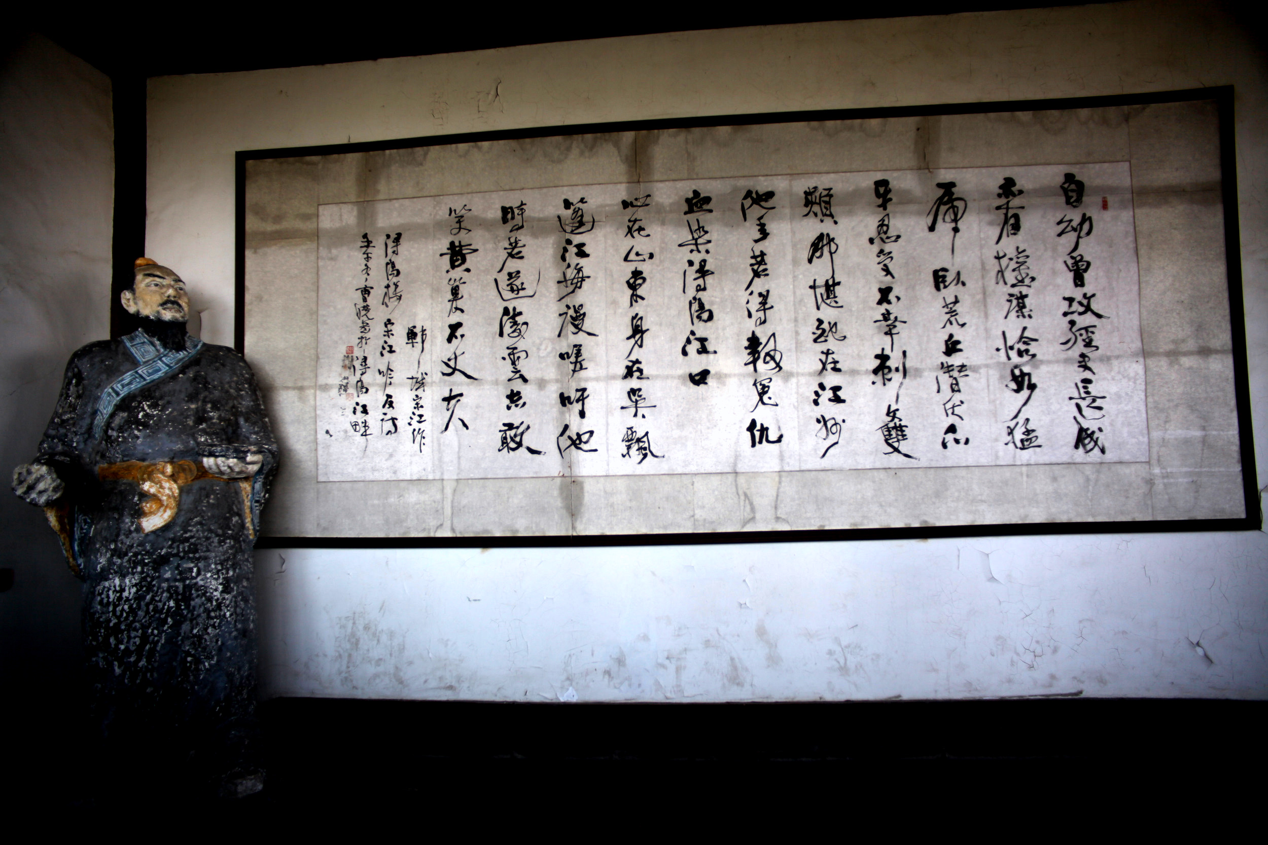 九江浔阳楼宋江像与浔阳楼反诗